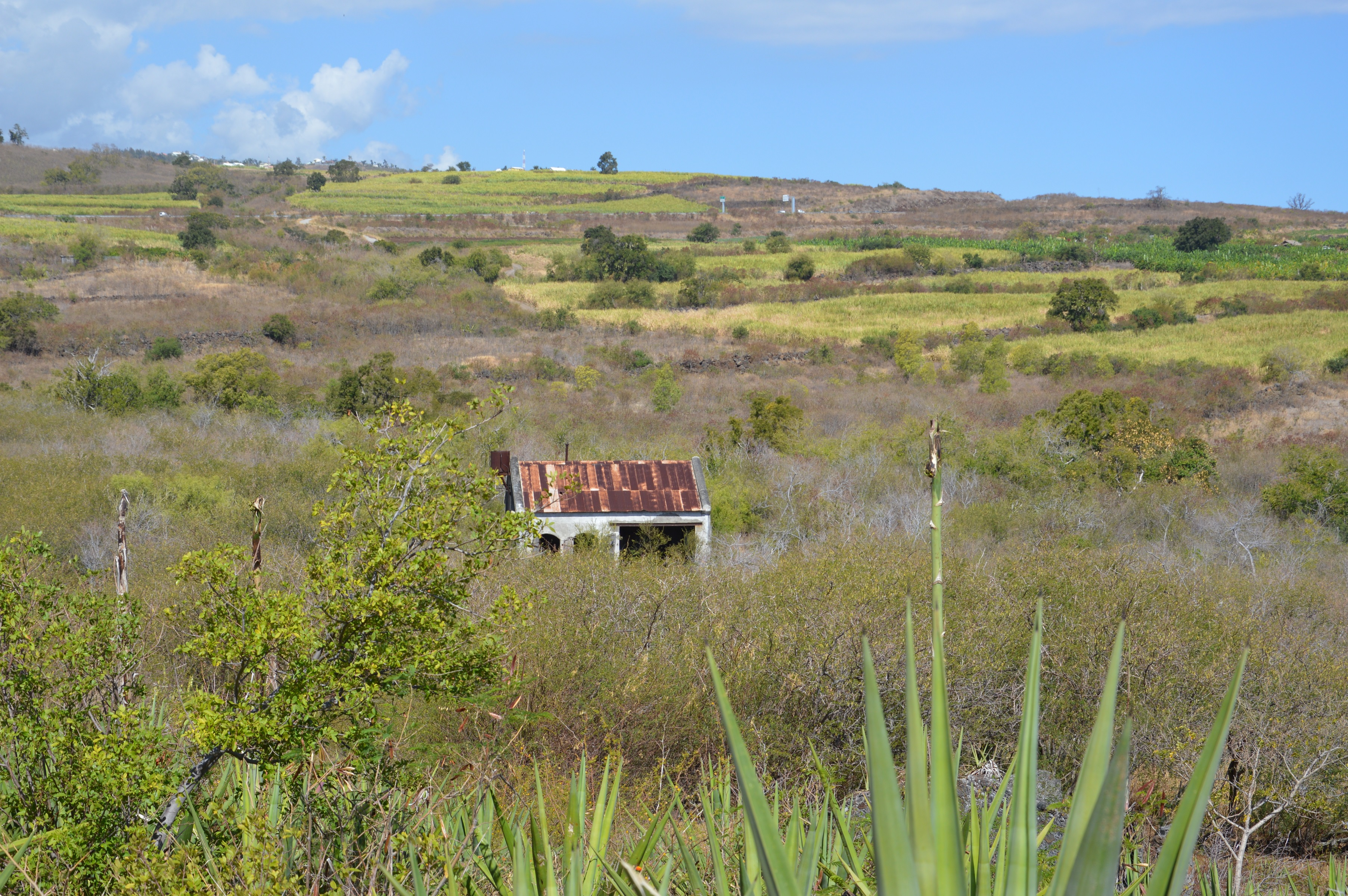 Vue station de pompage